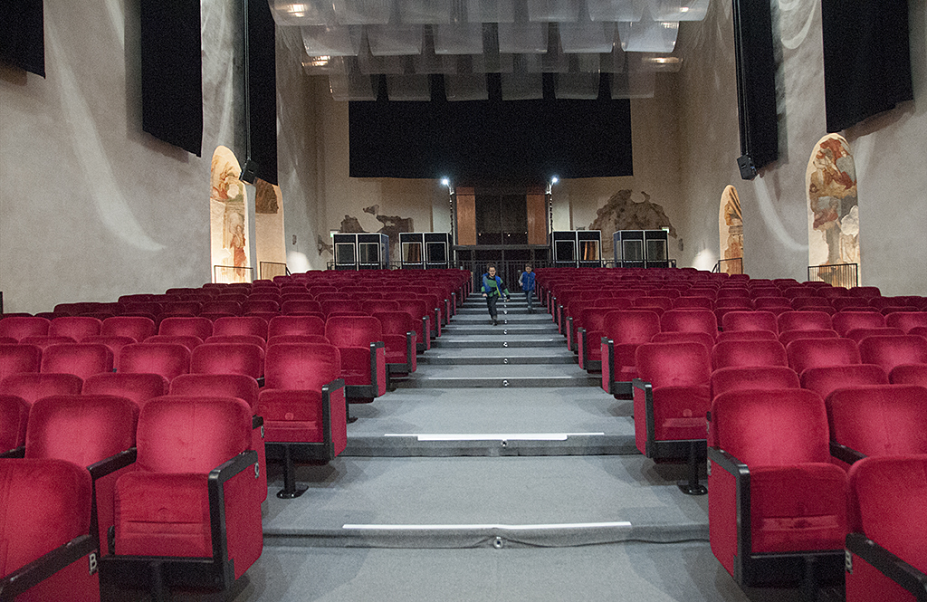 Spoleto - Chiostro di San Nicolò